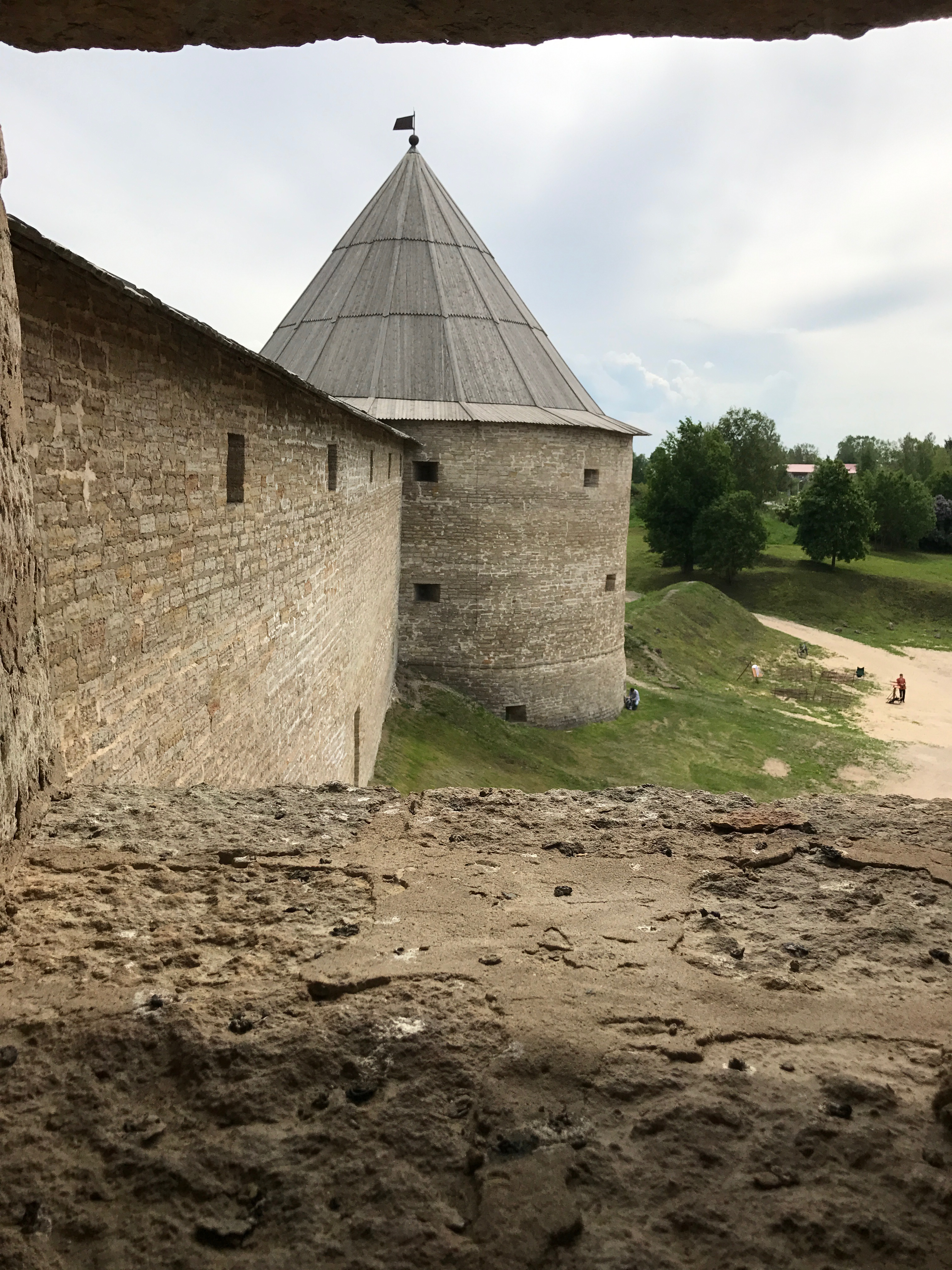 Староладожская крепость